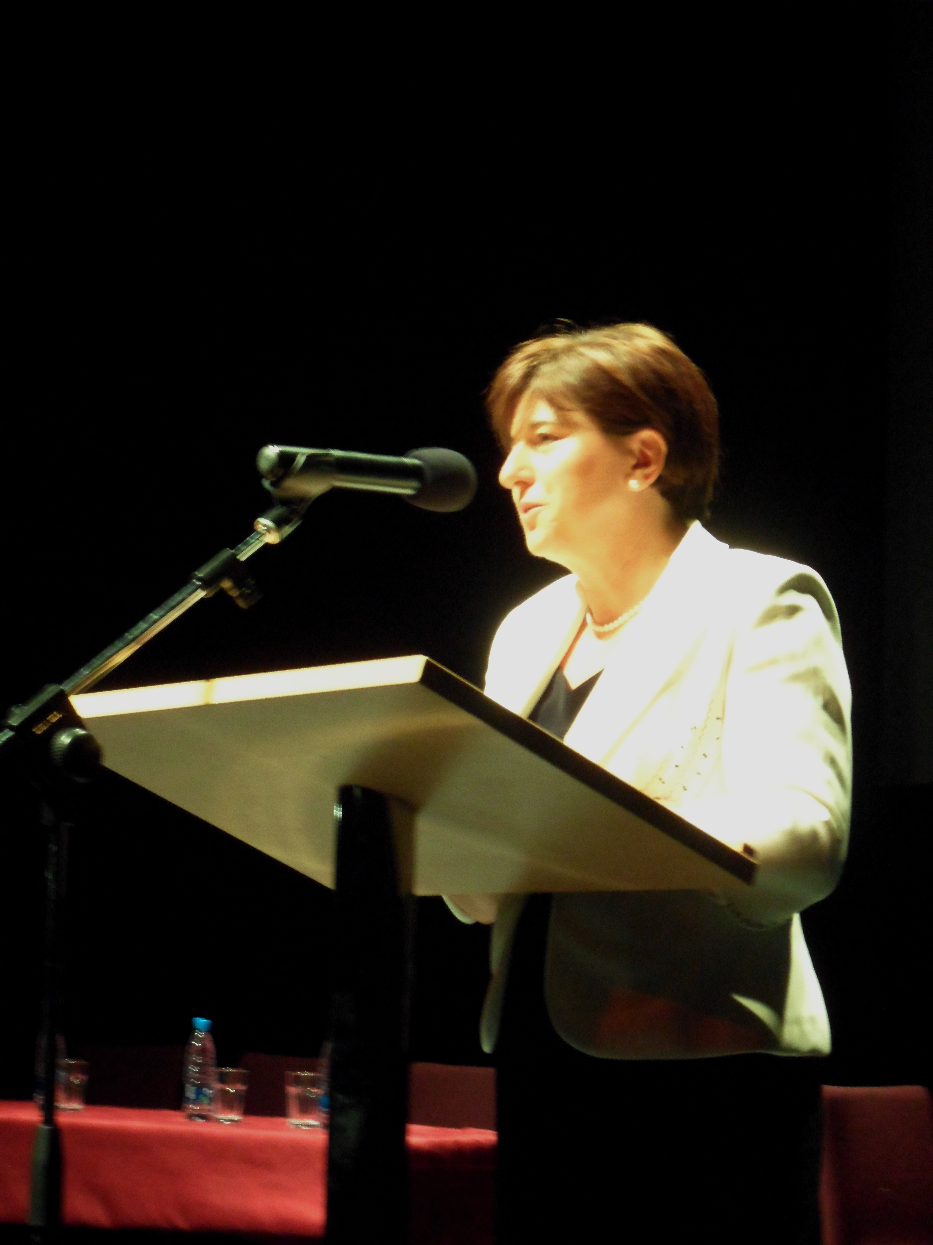 Ljudmila Novak, slovenska političarka, leta 2012 v Kopru